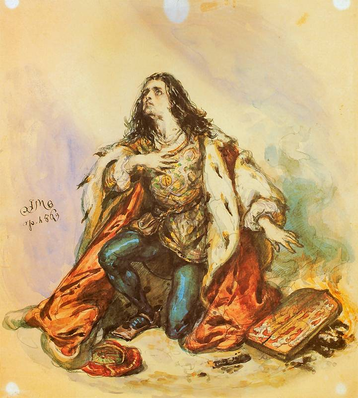 Święty Kazimierz